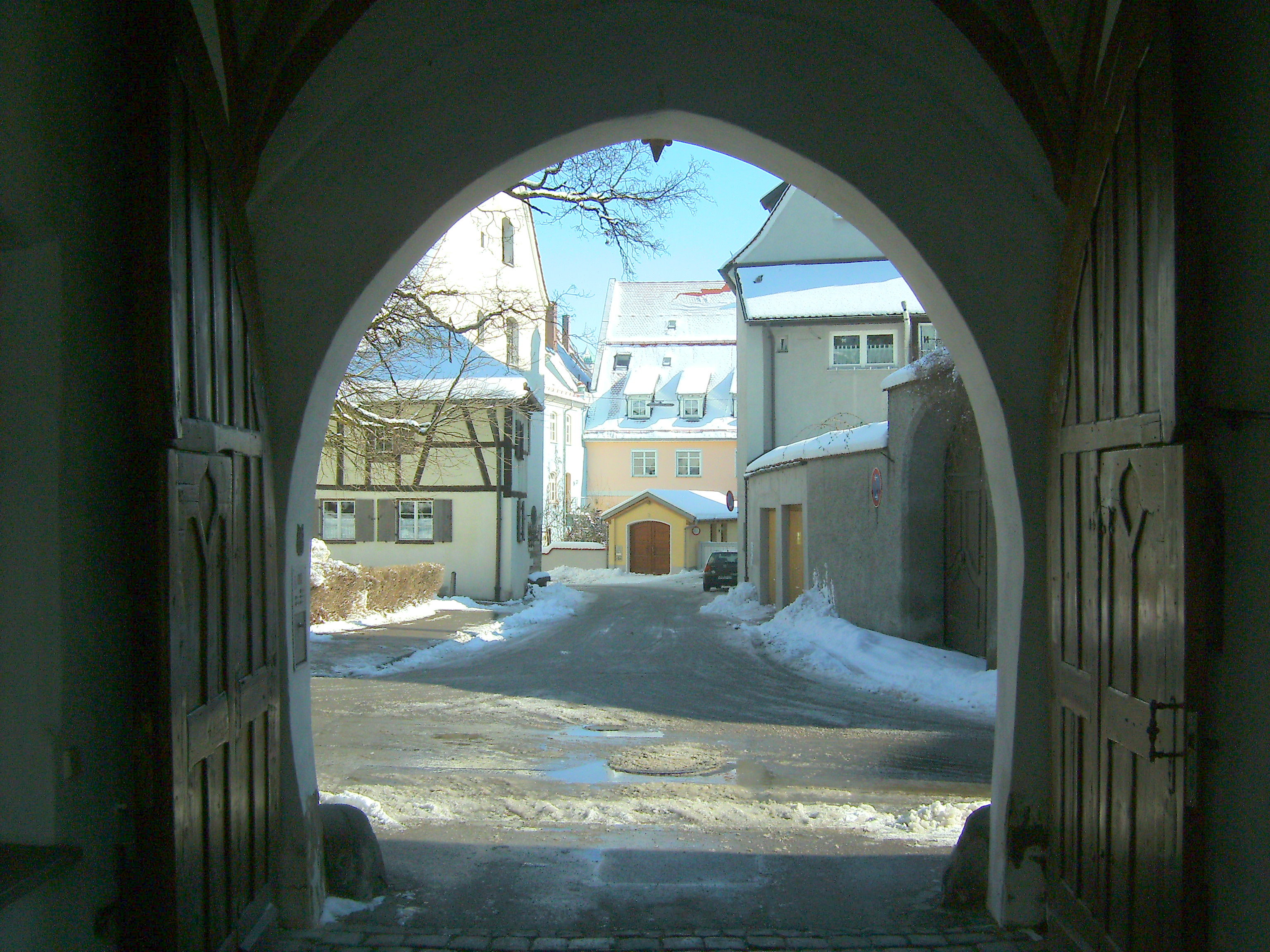 Antoniter-Strigel-Museum Memmingen - Stifterbild Vöhlin.